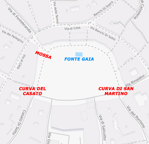 Mappa di Siena, con evidenziata la Pista del Palio di Siena